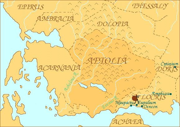 Mapa de la antigua Etolia